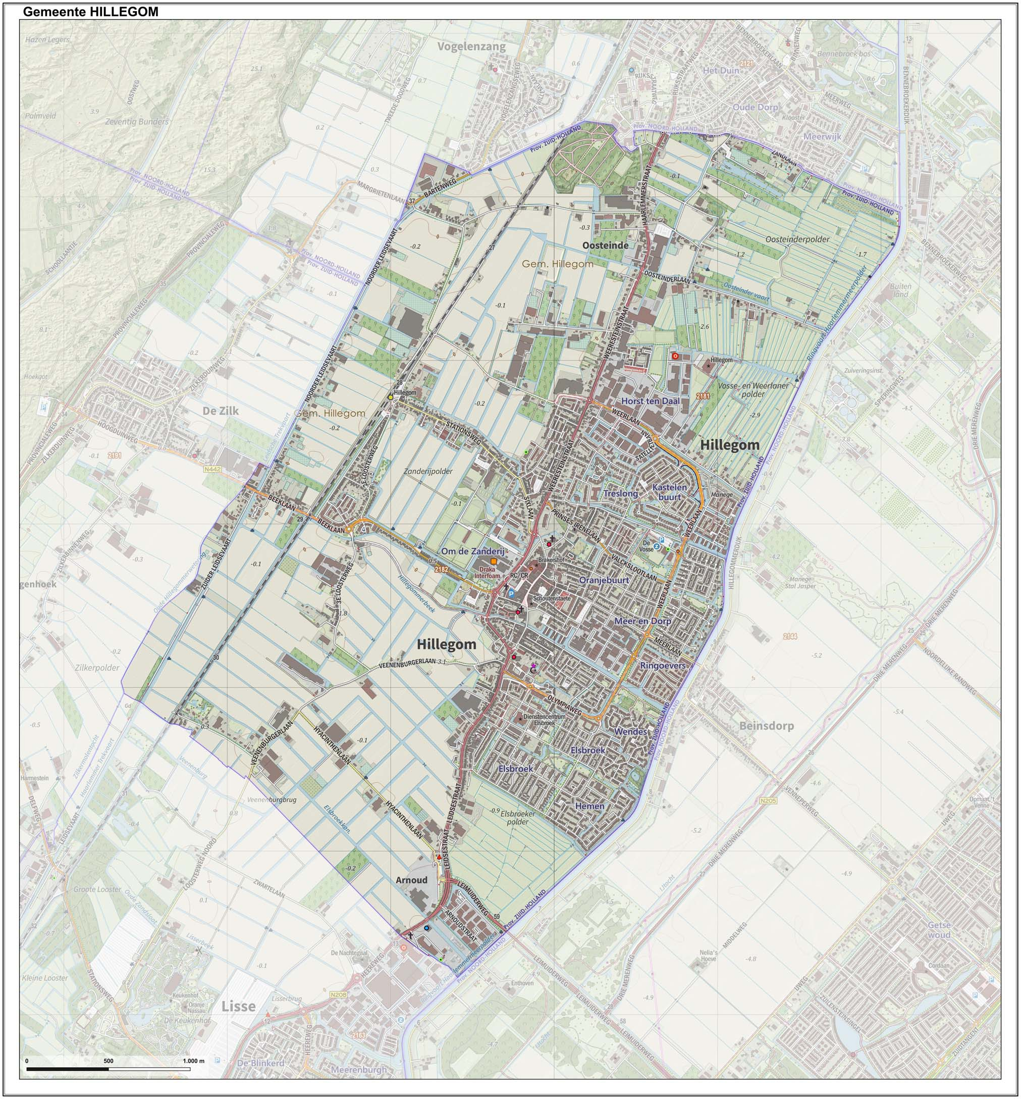 Topografische gemeentekaart. Resolutie: 400 pixels/km. Kaartbeeld samengesteld uit de open geodata van de Top10NL en Top25namen (Kadaster), Creative Commons-BY licentie. Gebouwvlakken uit open geodata BAG extract. Wegen uit de OpenStreetMap, OpenStreetMap community. Reliëfschaduw uit de Actuele Hoogtekaart AHN2. Samenstelling en kleurenschema: Jan-Willem van Aalst, met QGIS. Zie ook de Legenda.